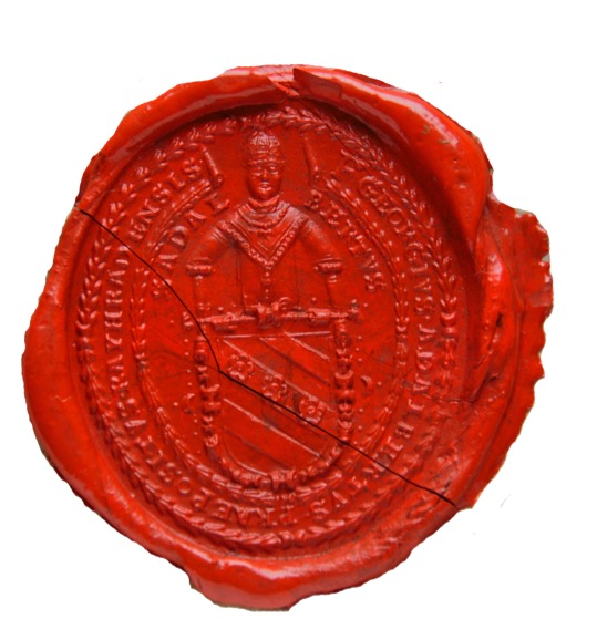 Jiří Vojtěch Kotelík z Horštejna, probošt Rajhradského kláštery, 1623 – 1643